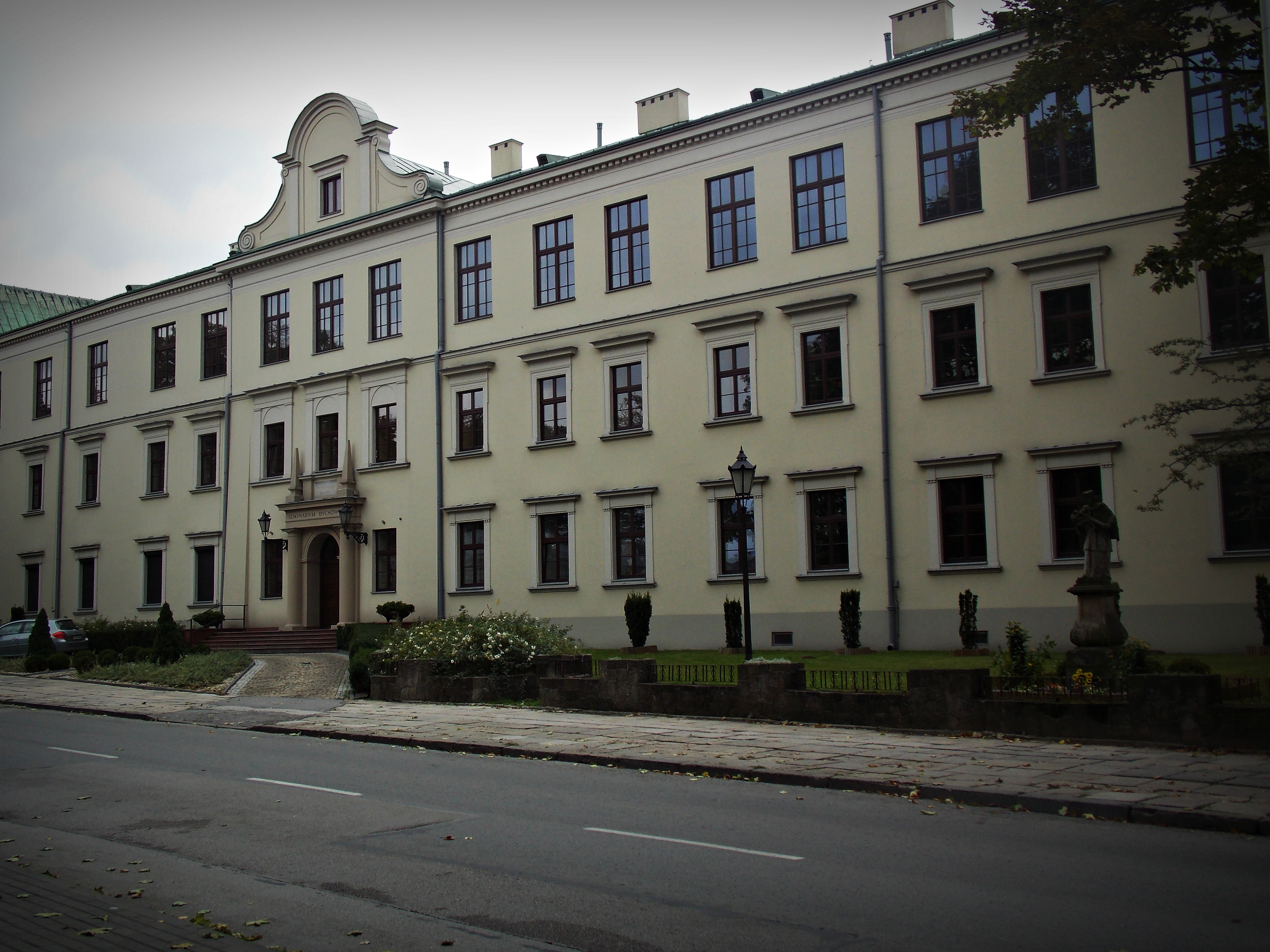 Seminarium Kielce ul. Jana Pawła II 7, Kielce 11.2007.